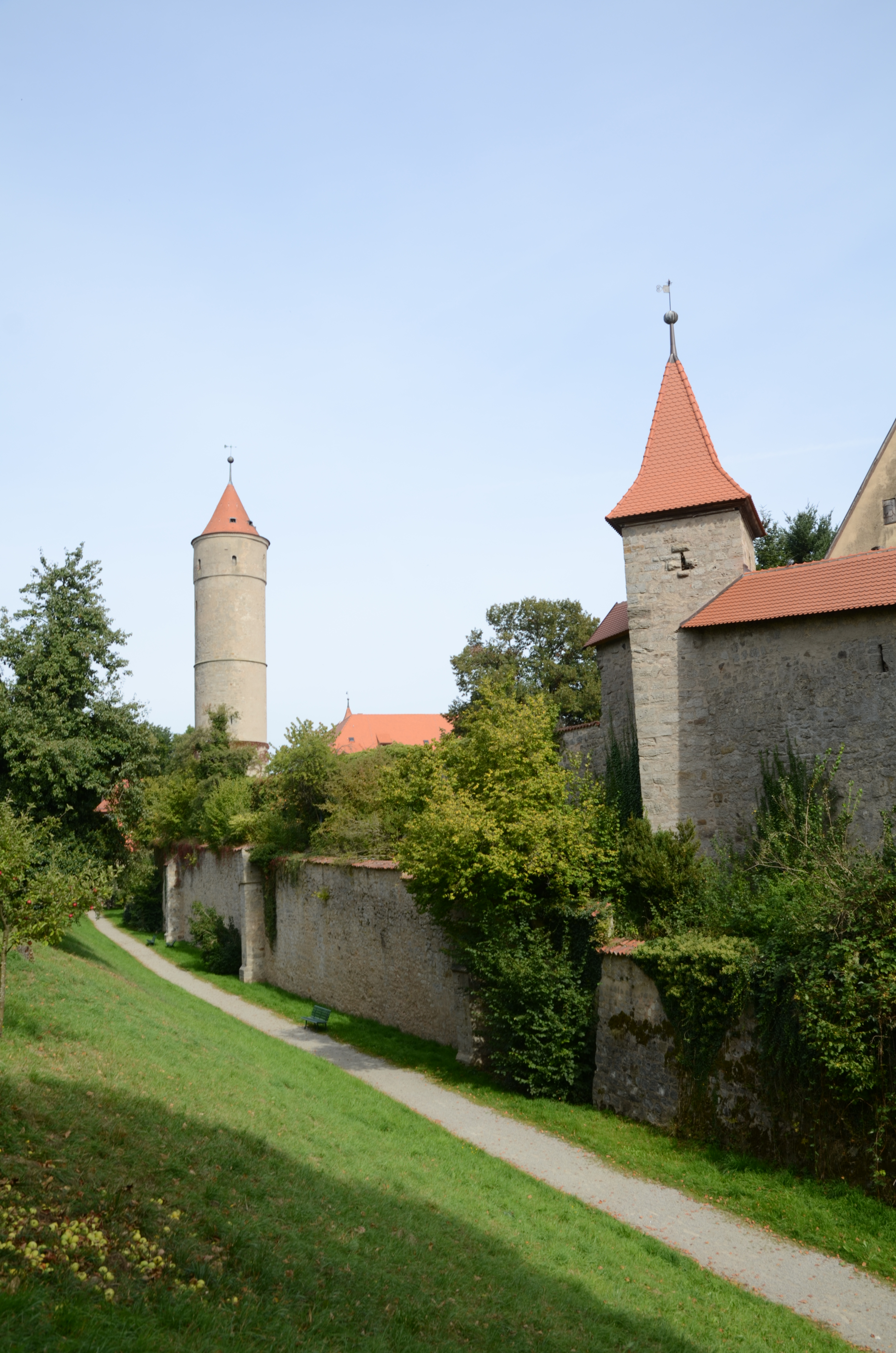 Dinkelsbühl Stadtgraben Kapuzinerweg 1 Dreikönigsturm Grüner Turm